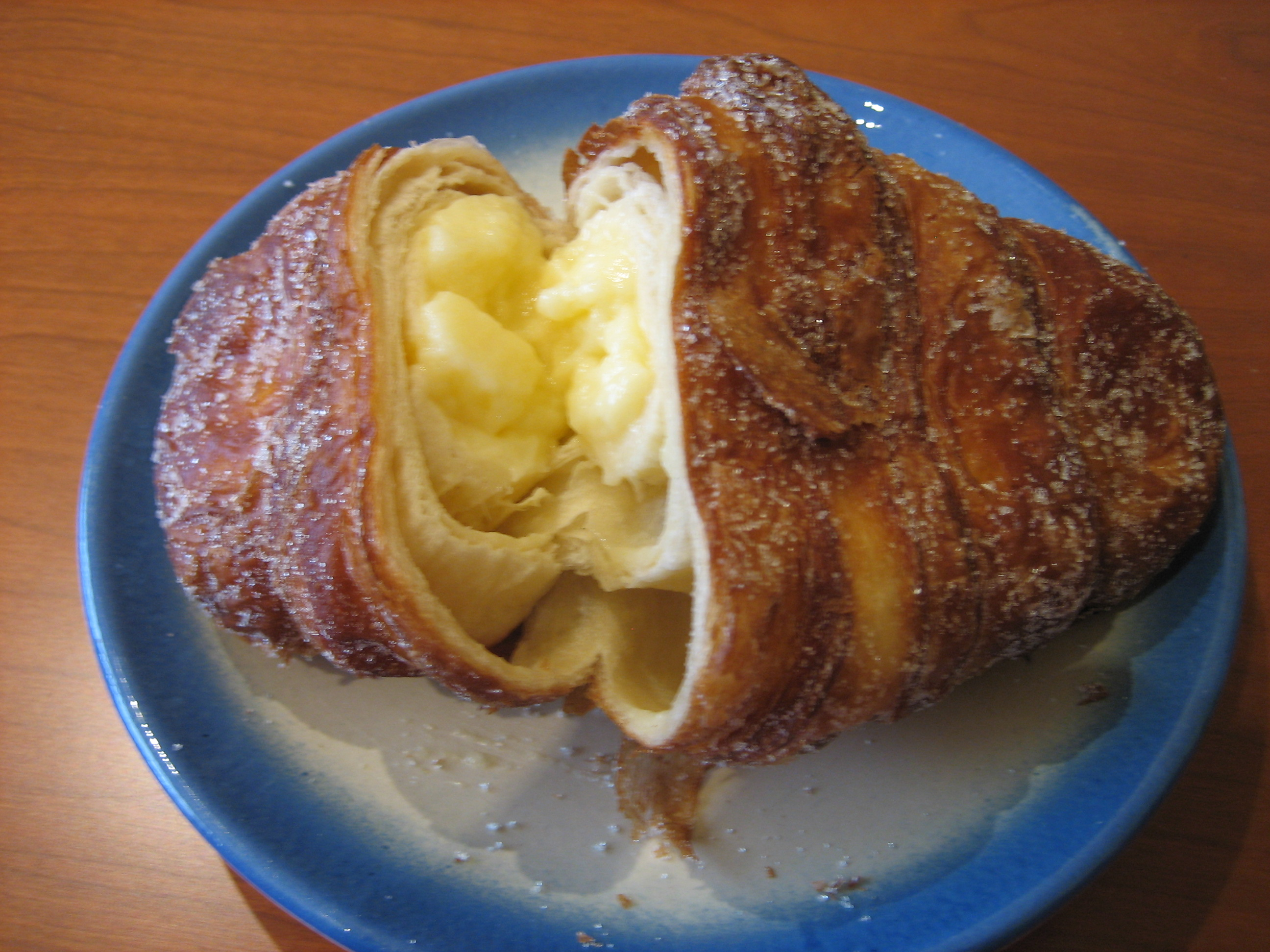 pasta dolça